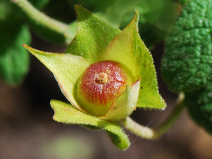 Ciste à feuilles de sauge